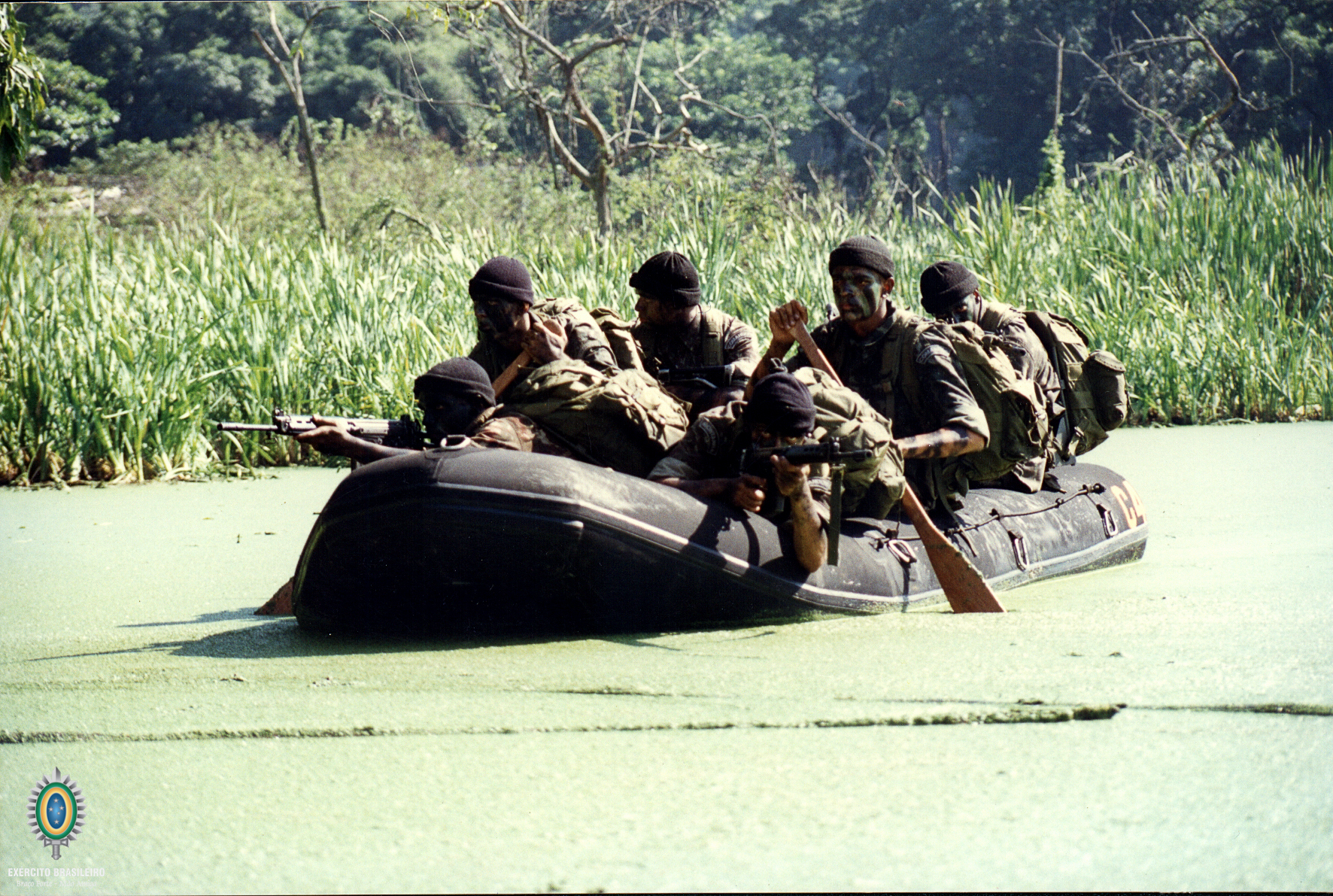 Comandos, Forças Especiais, combatente, Exército, Tiro instintivo caatinga, paraquedistas, atirador, sniper, mergulhadores